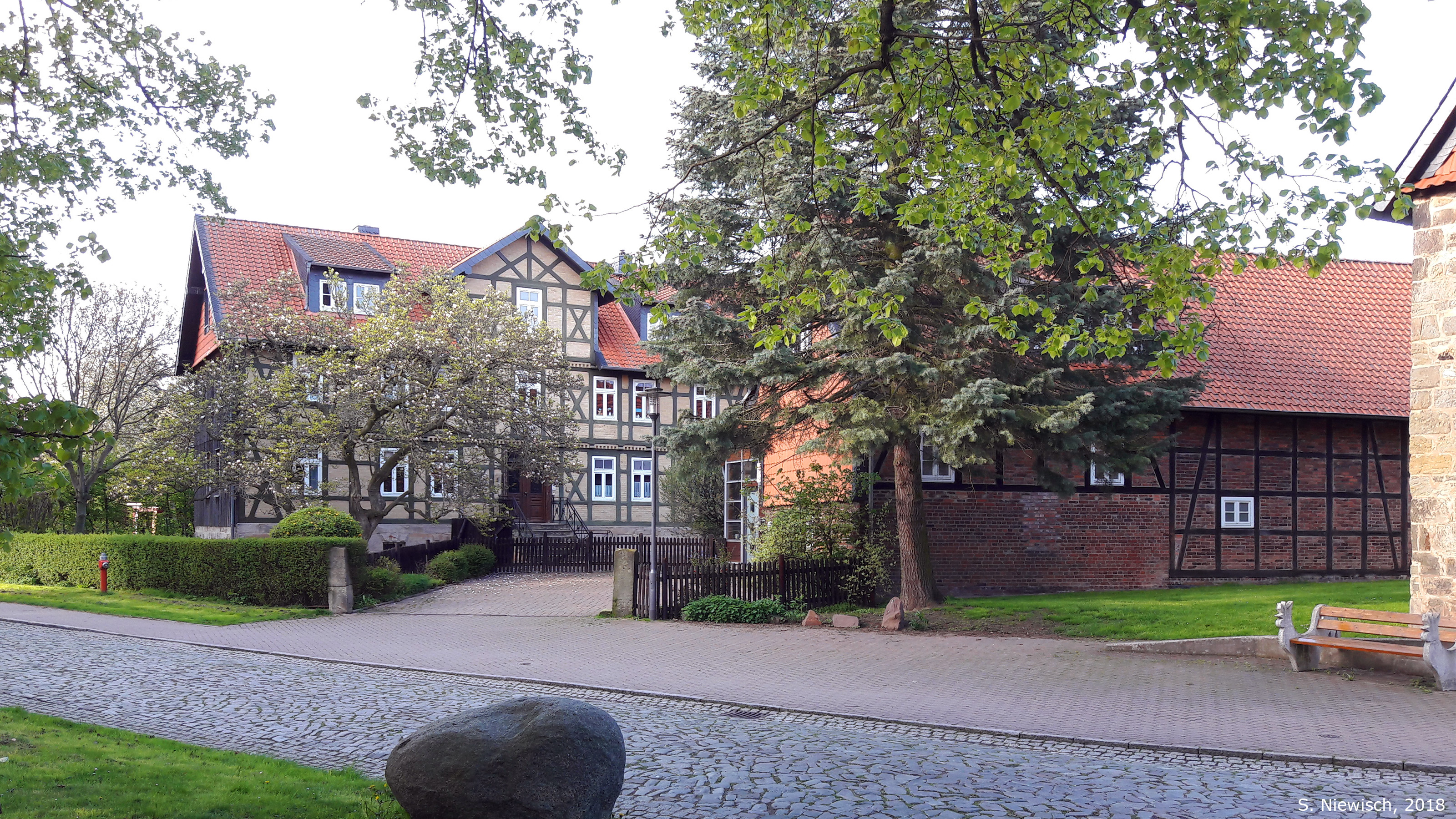 Goslar-Hahndorf, Jerstedter Straße